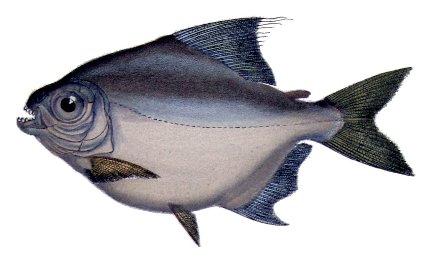 Myletes doidyxodon = Myleus setiger